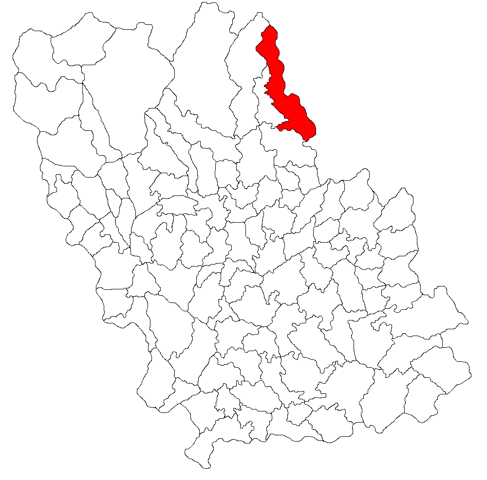 Categorie:Hărţi ale judeţului Prahova